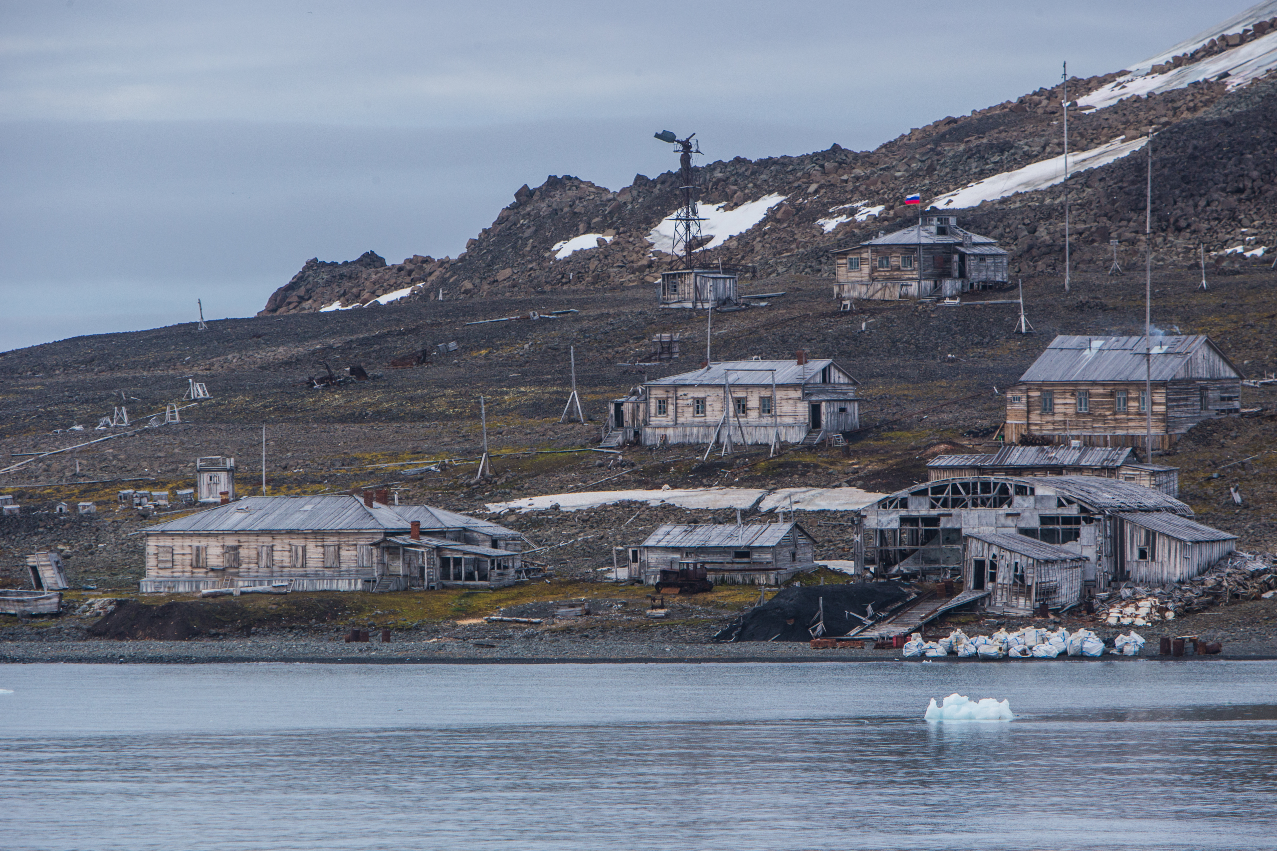 Комплексный заказник Земля Франца-Иосифа, Приморский район This image is related to the protected area of Russia number 2930163